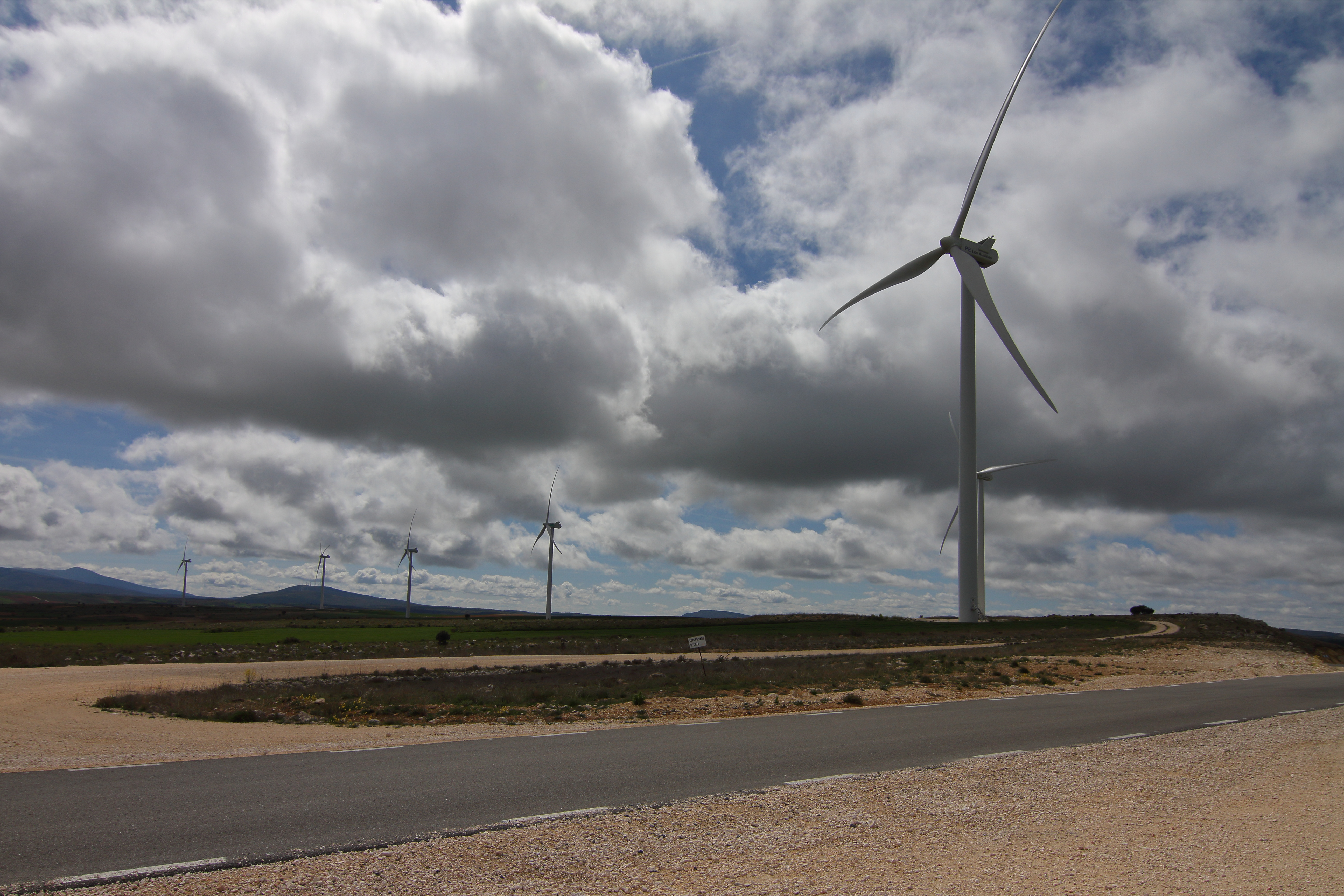 Parque eólico Los Ausines,02